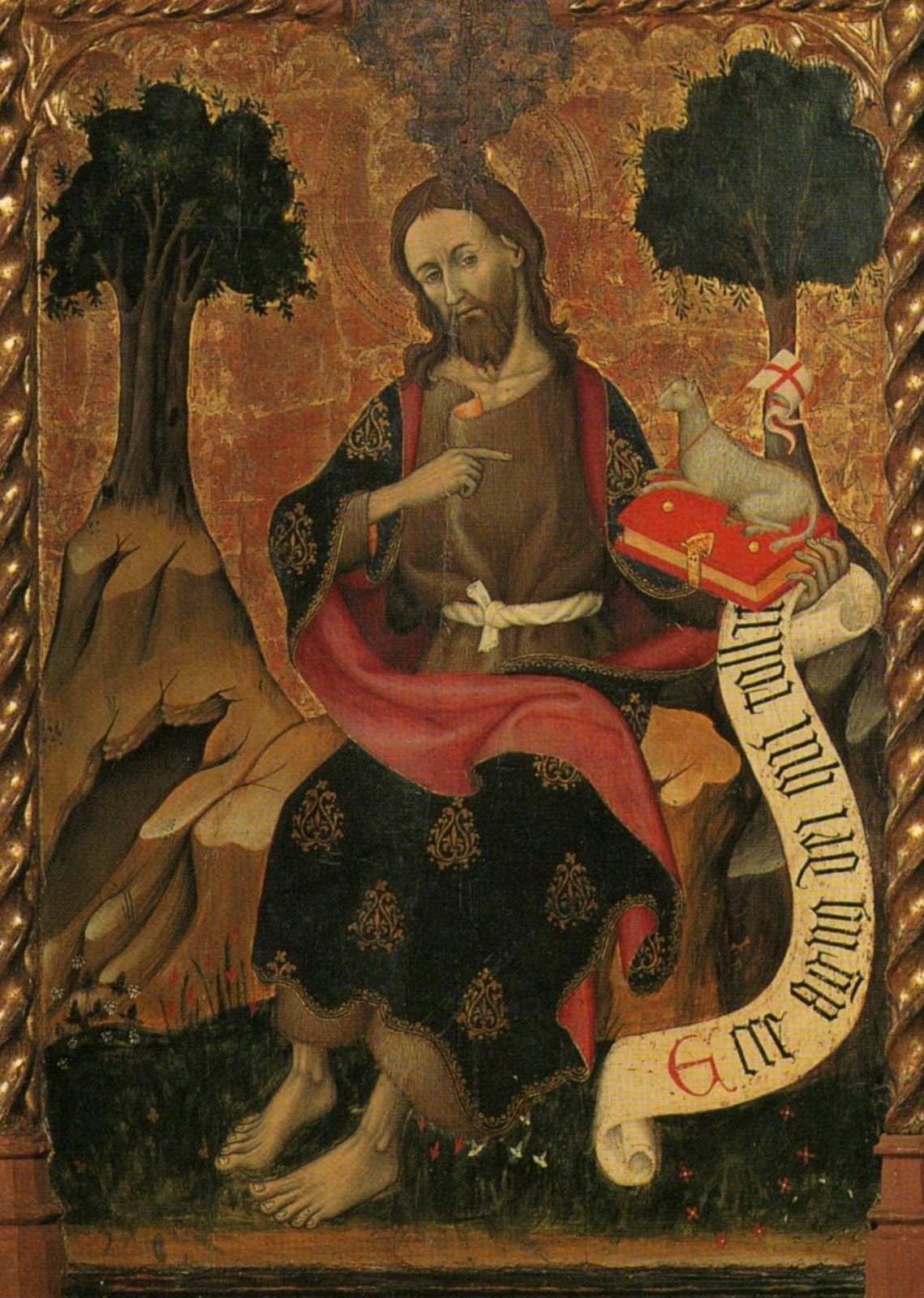 Taula central del retaule de Sant Joan, per Bernat Martorell. Procedeix de Sant Joan de Cabrera de Mar, avui al Museu Diocesà de Barcelona. ca. 1425